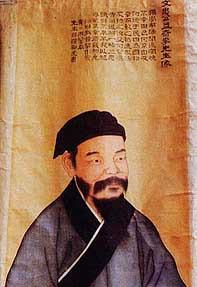 Yi Je-hyun